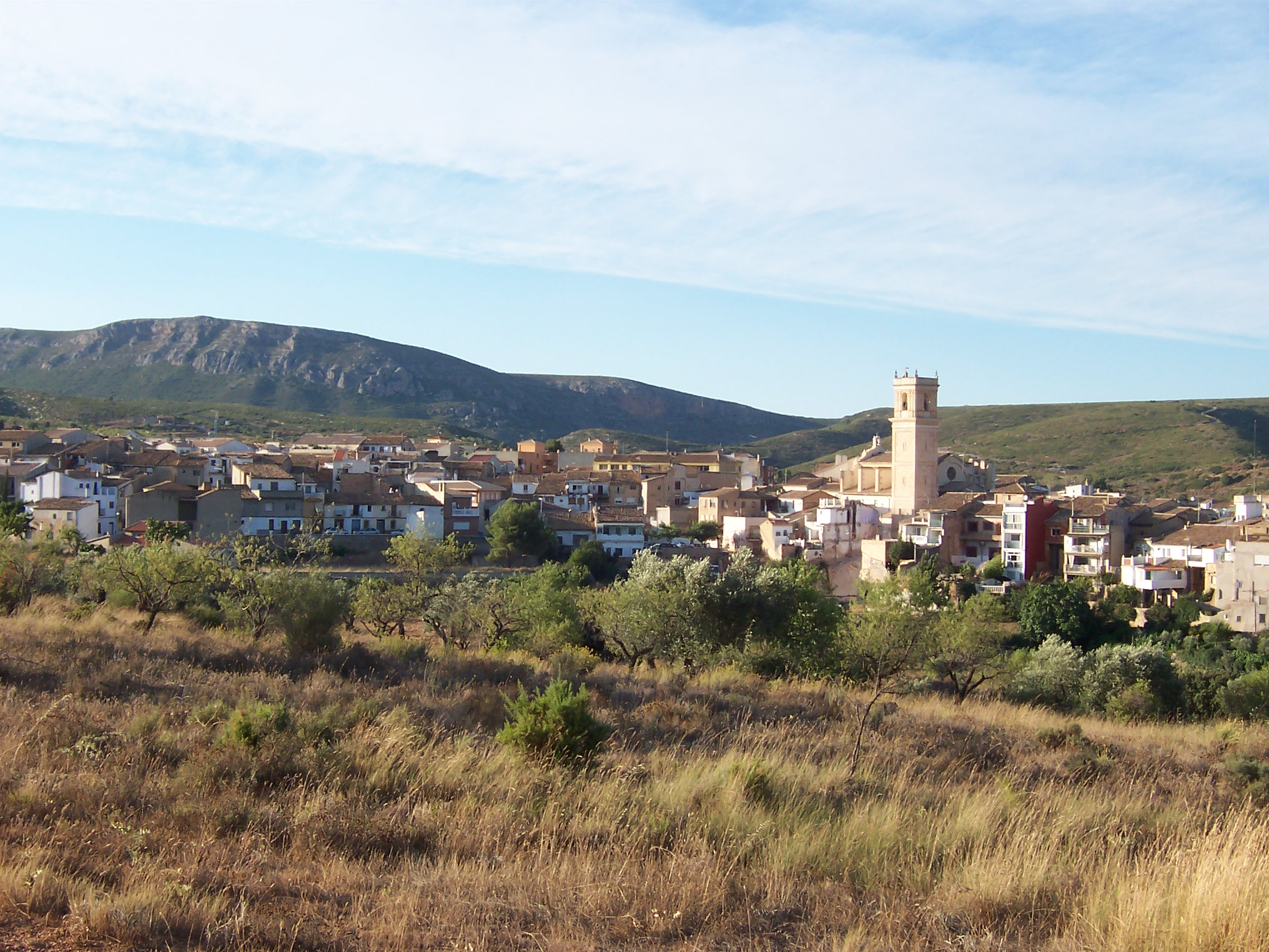 Fotografía del municipio valenciano de Siete Aguas realizada por José Francisco Català Senent en Agosto del año 2004